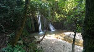 Le Cascatelle di San Vittorino